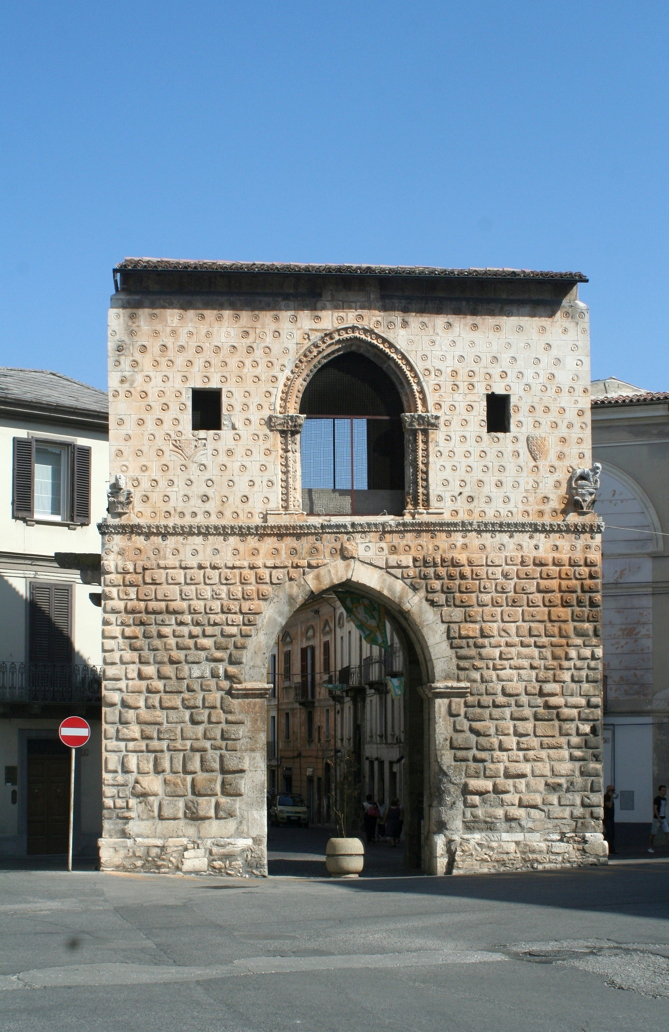 Porta Napoli Sulmona 2011